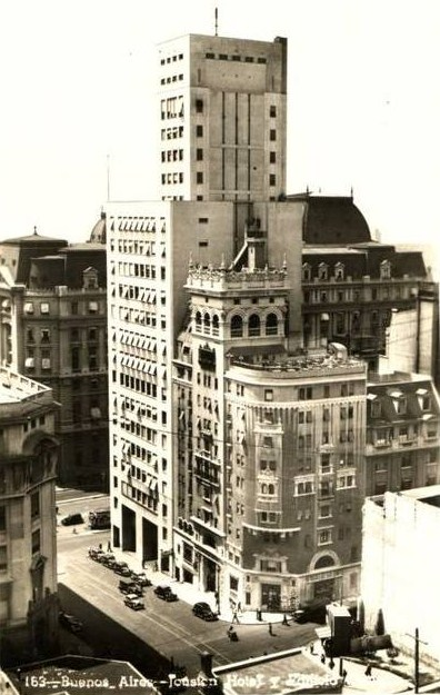 Vista aérea de la Avenida Corrientes entre la calle 25 de Mayo y la Avenida Leandro N. Alem. A la izquierda, vista del contrafrente del Edificio COMEGA (1933), a la derecha el Jousten Hotel (1928).